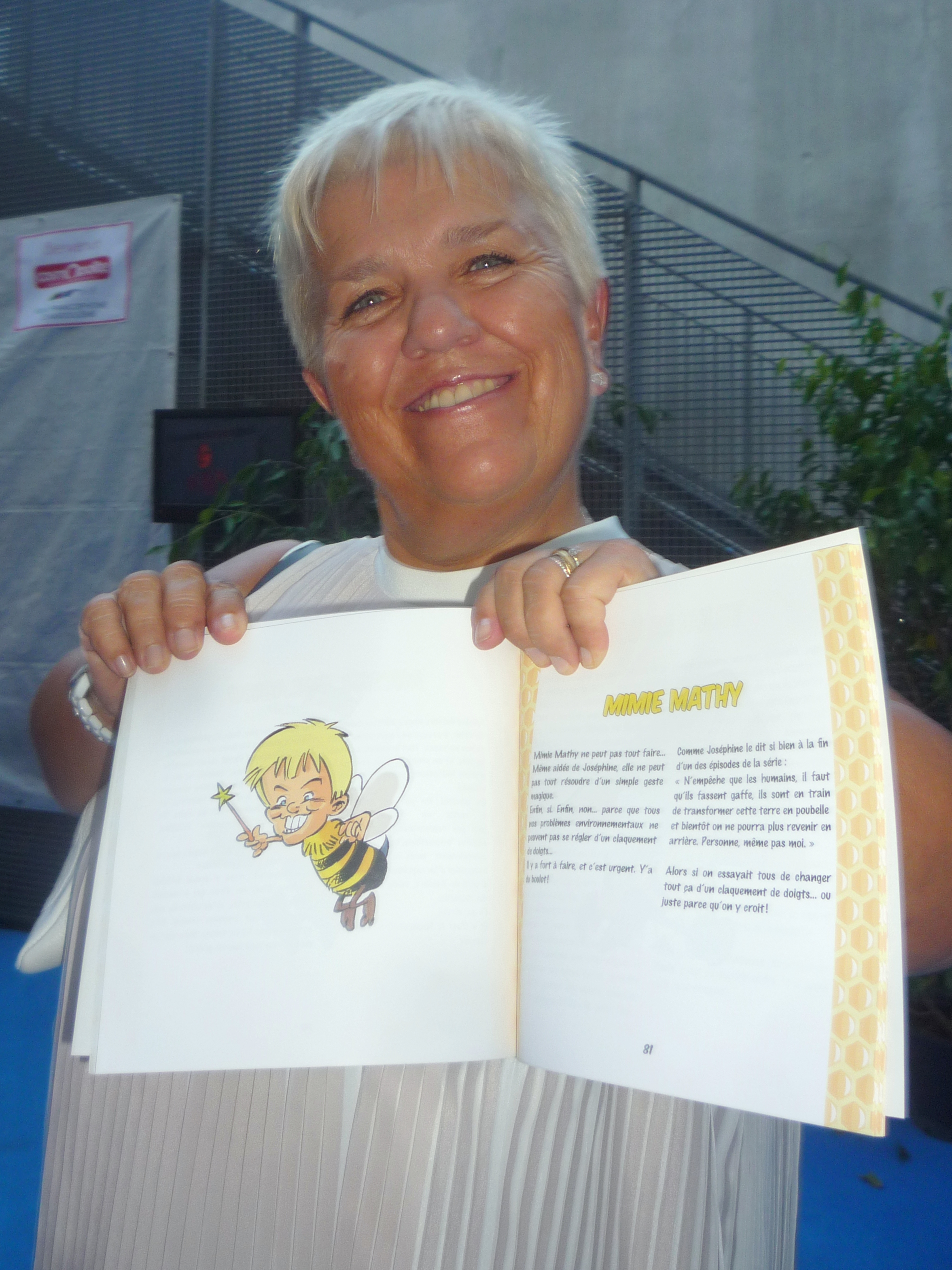 Librairie Cosmopolite, Angoulême 2016